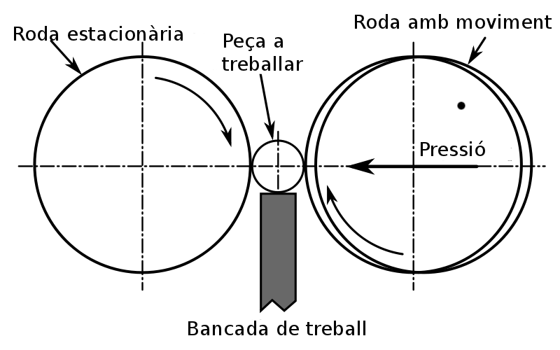 Esquema rectificado exterior sin puntos o descentrado